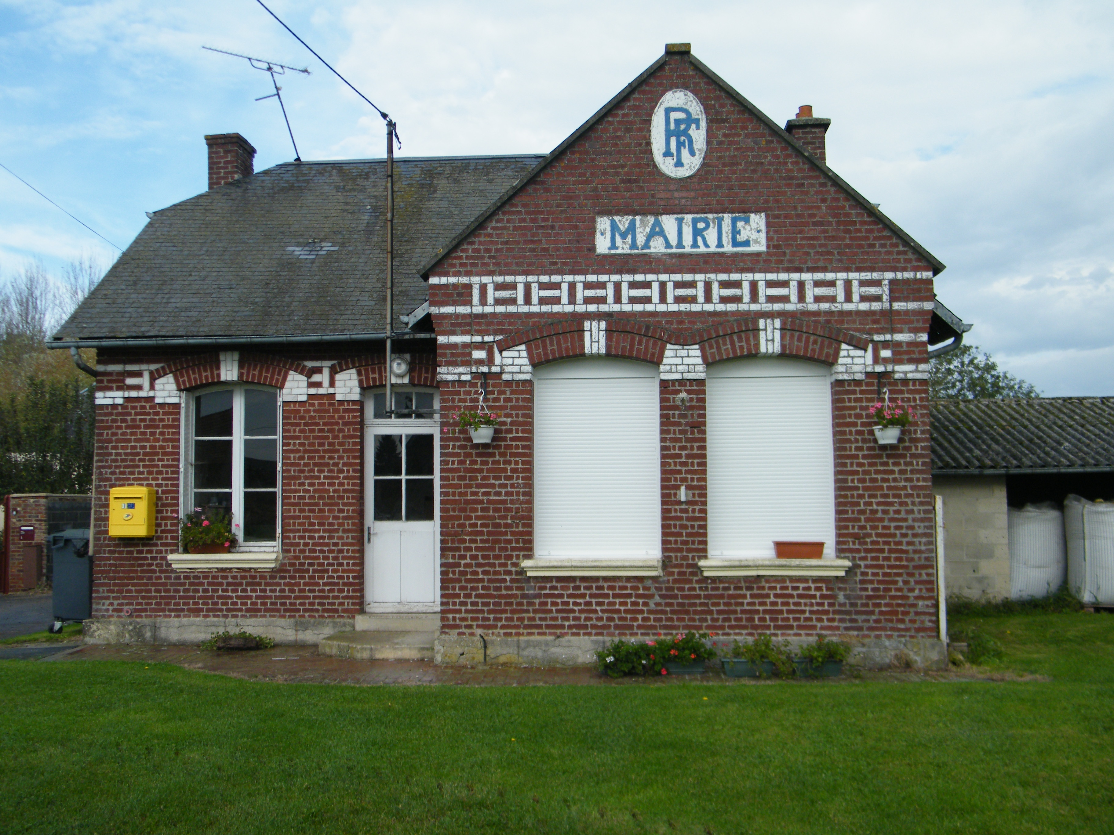 Ancienne mairie de Grécourt, avant la fusion avec Hombleux.